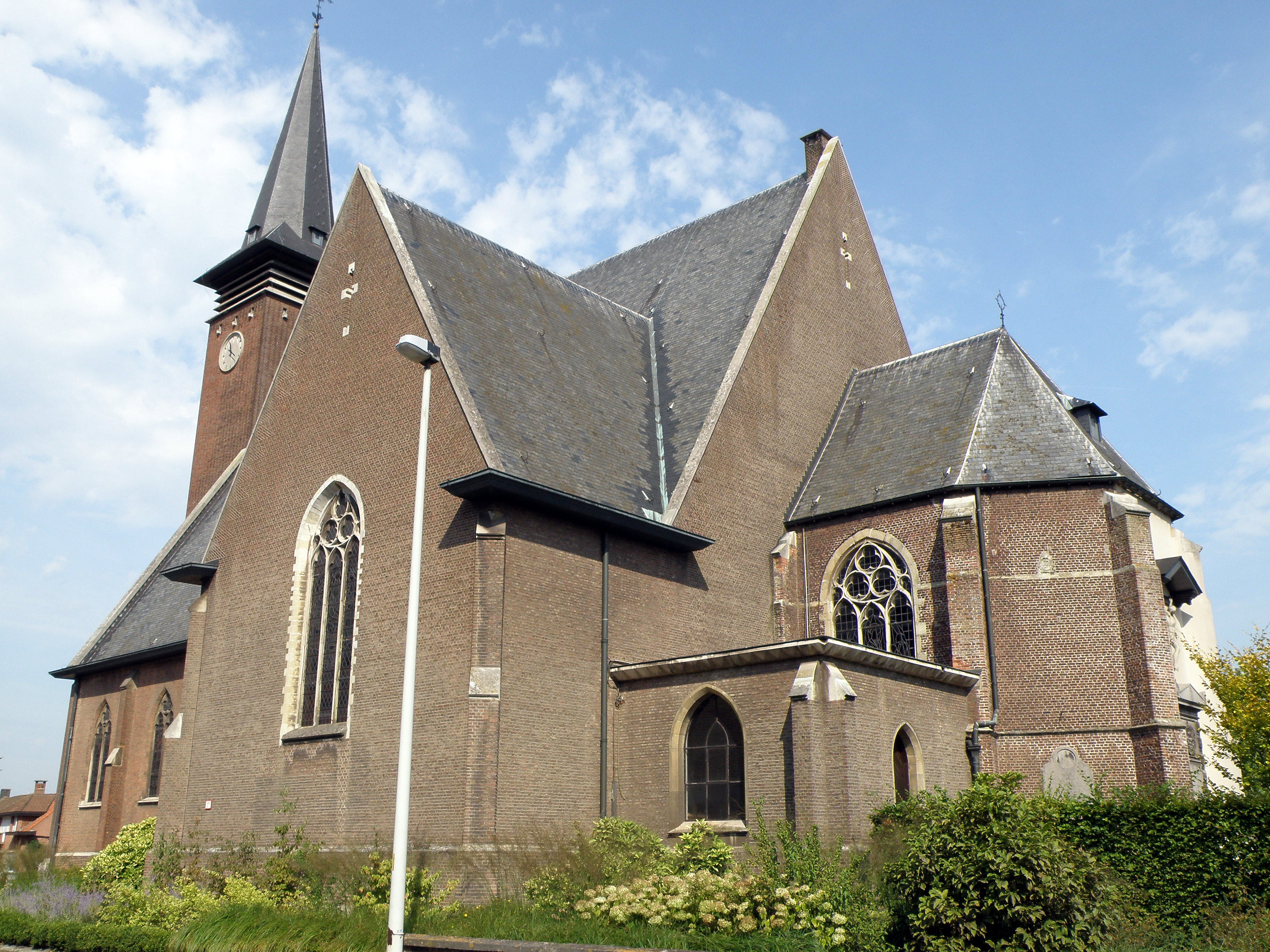 Berendrecht, stad Antwerpen (district Berendrecht-Zandvliet-Lillo): neogotische Sint-Jan de Doperkerk, zuidergevel en (laatgotisch, 1685) koor.